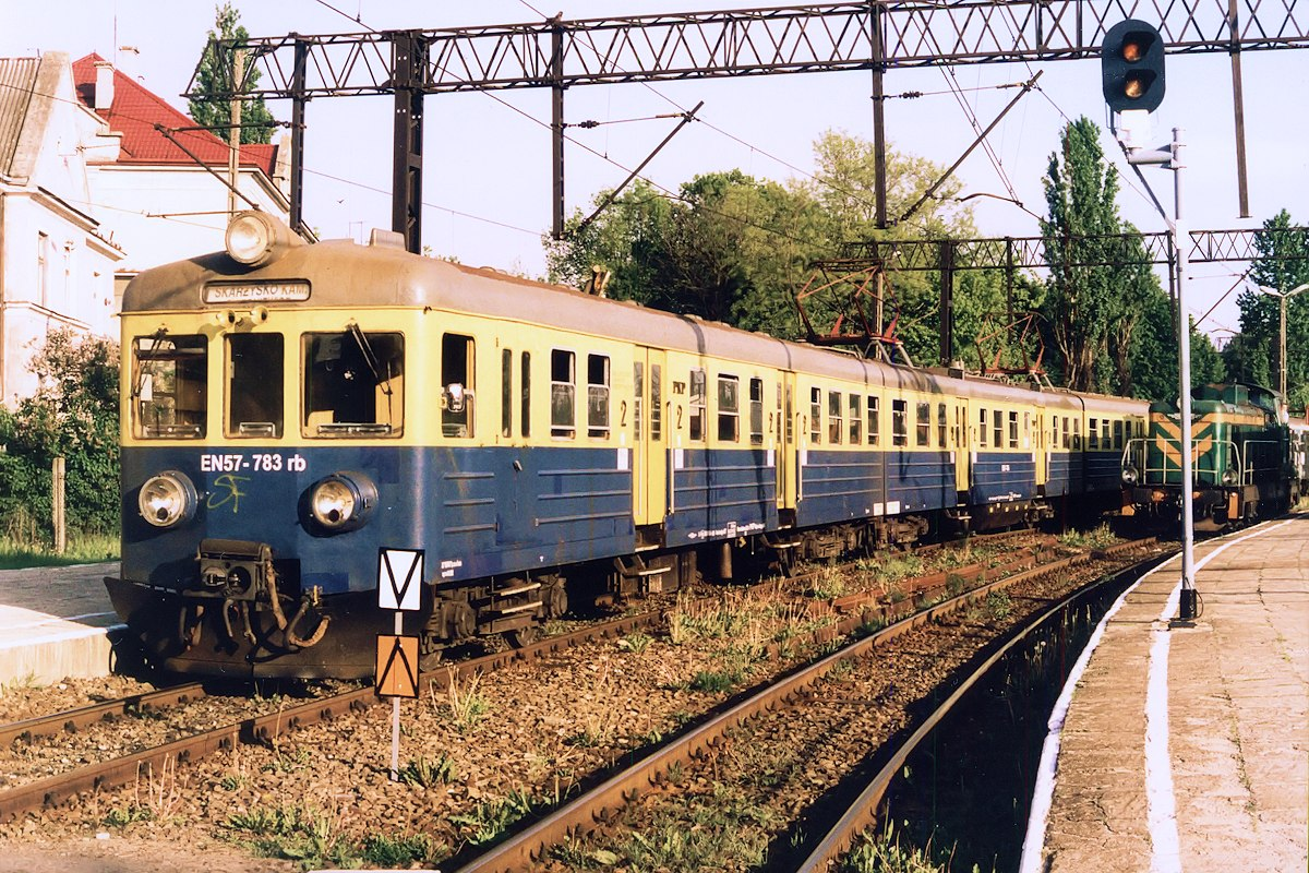 Elektryczny zespół trakcyjny EN57-783 stoi przy peronie 1 stacji Stalowa Wola Rozwadów.